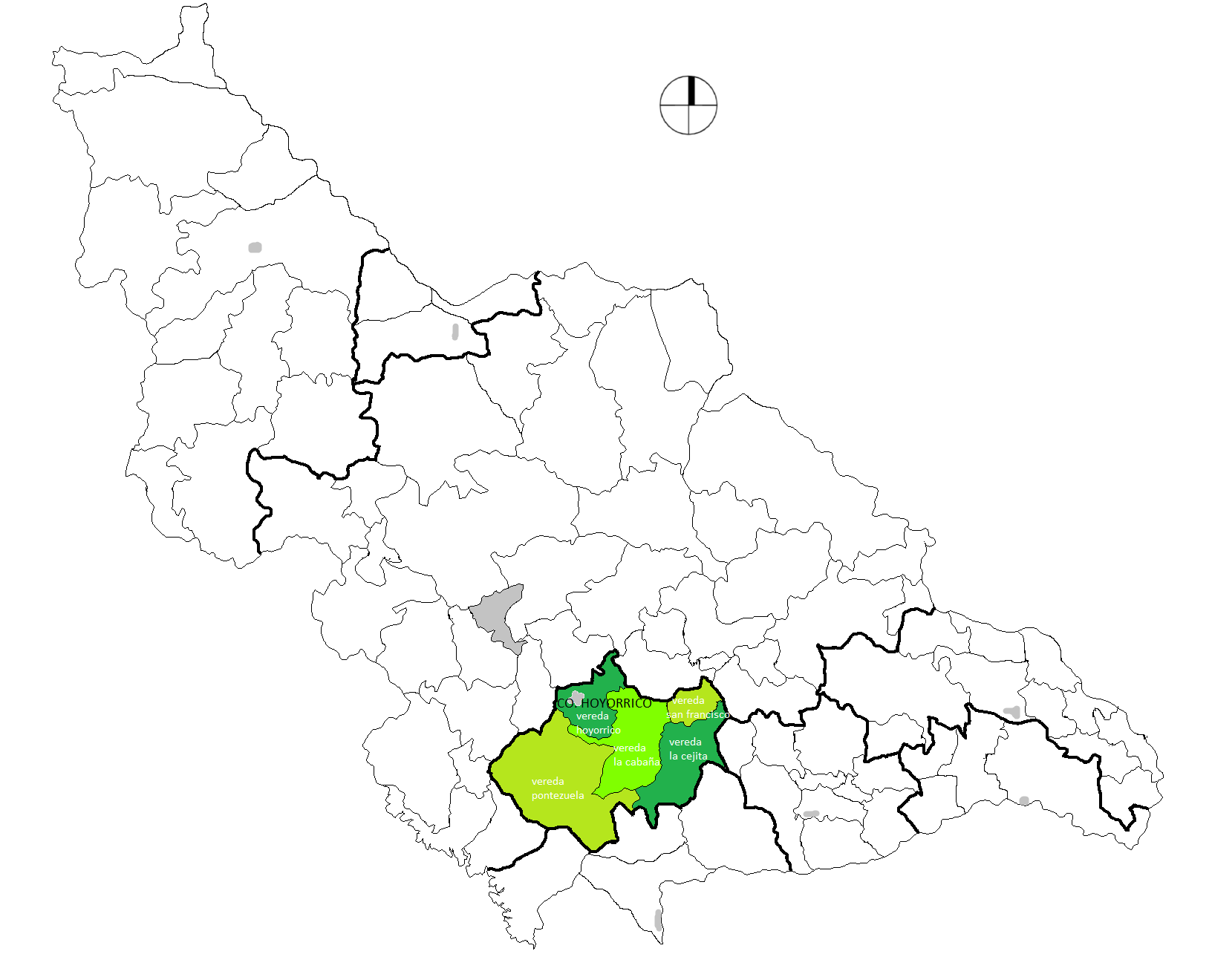 Veredas de Hoyorrico, Santa Rosa de Osos